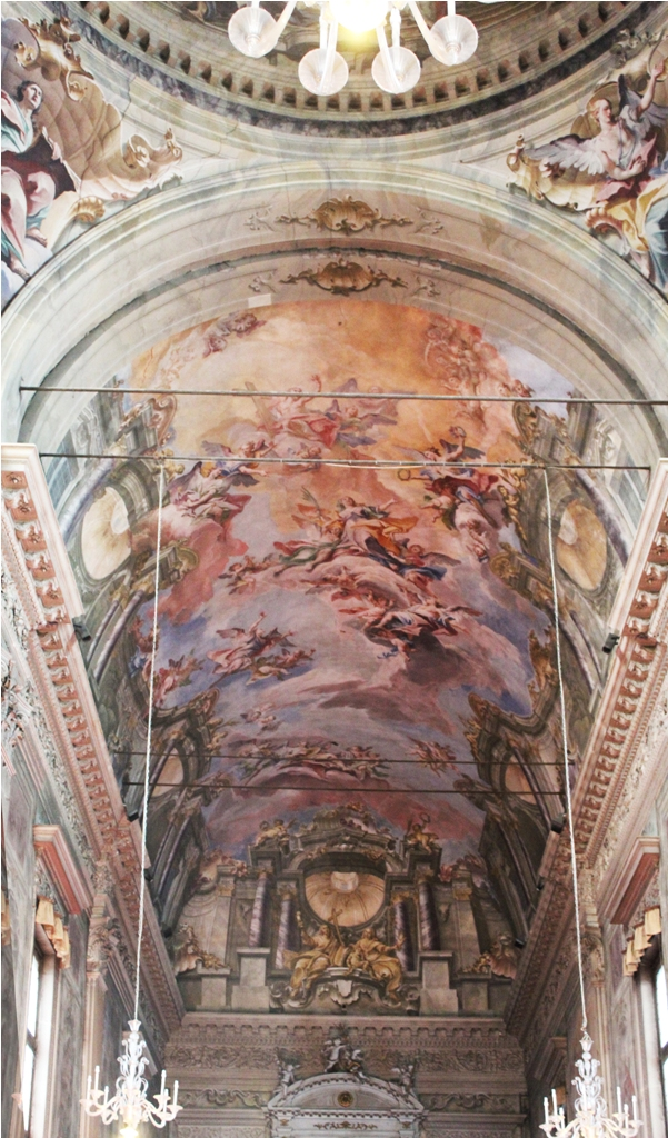 Discesa dello Spirito Santo su Maria e gli Apostoli (Antonio Mazza - Carlo Innocenzo Carloni) - Cupola presbiterio - Chiesa di S. Afra in S. Eufemia - Brescia